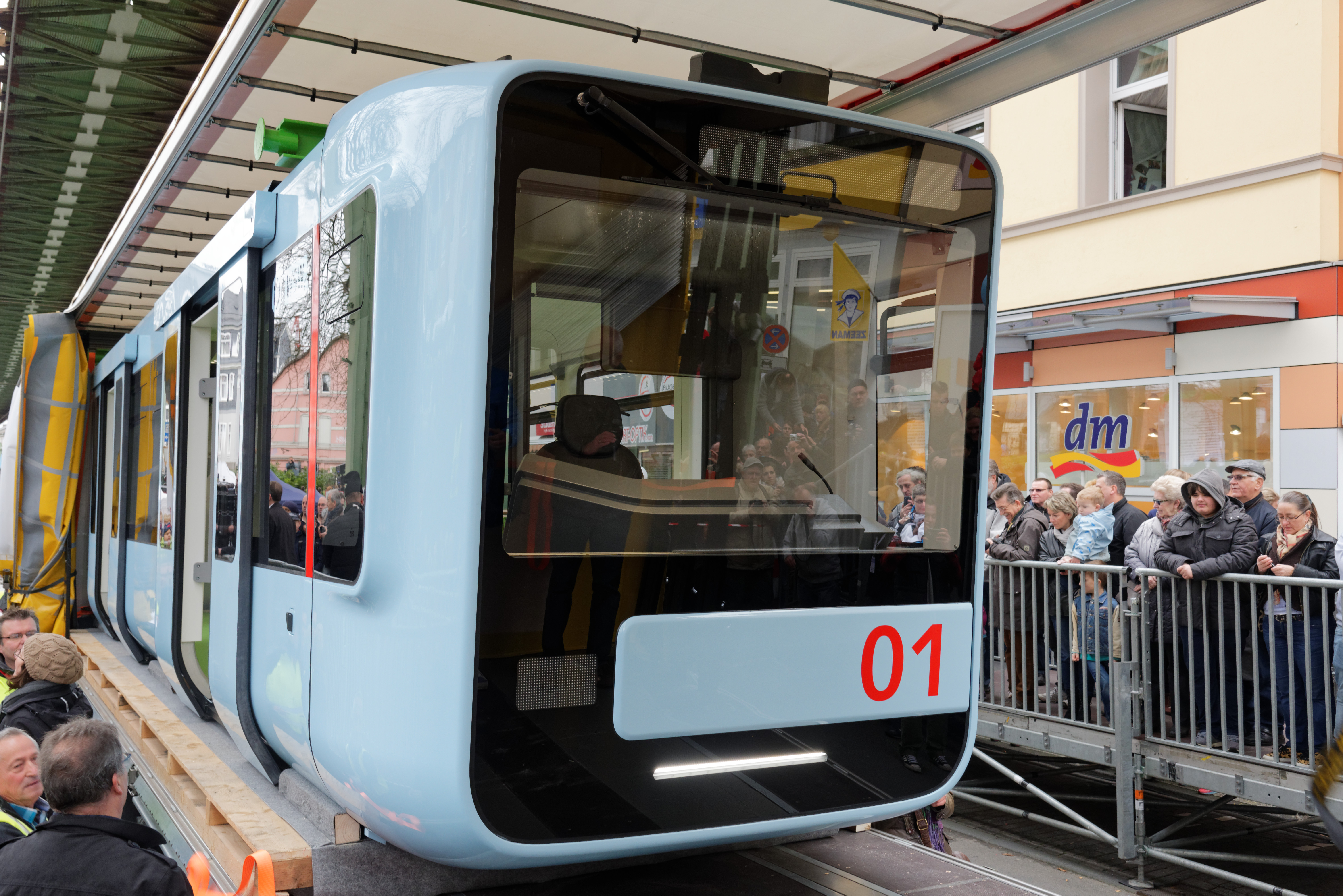 neue Schwebebahn von außen in Wuppertal